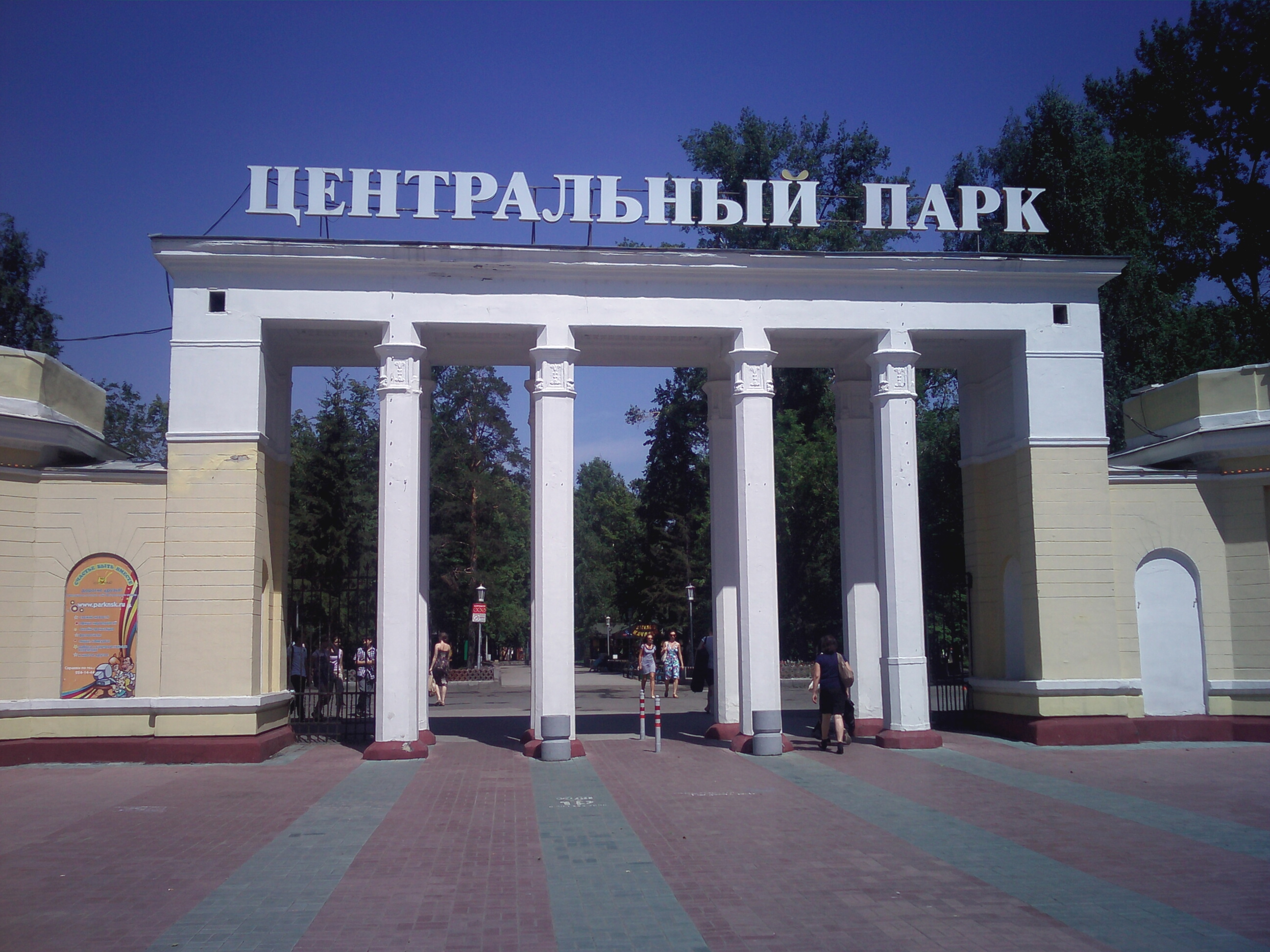 Главный вход в Центральный парк Новосибирска